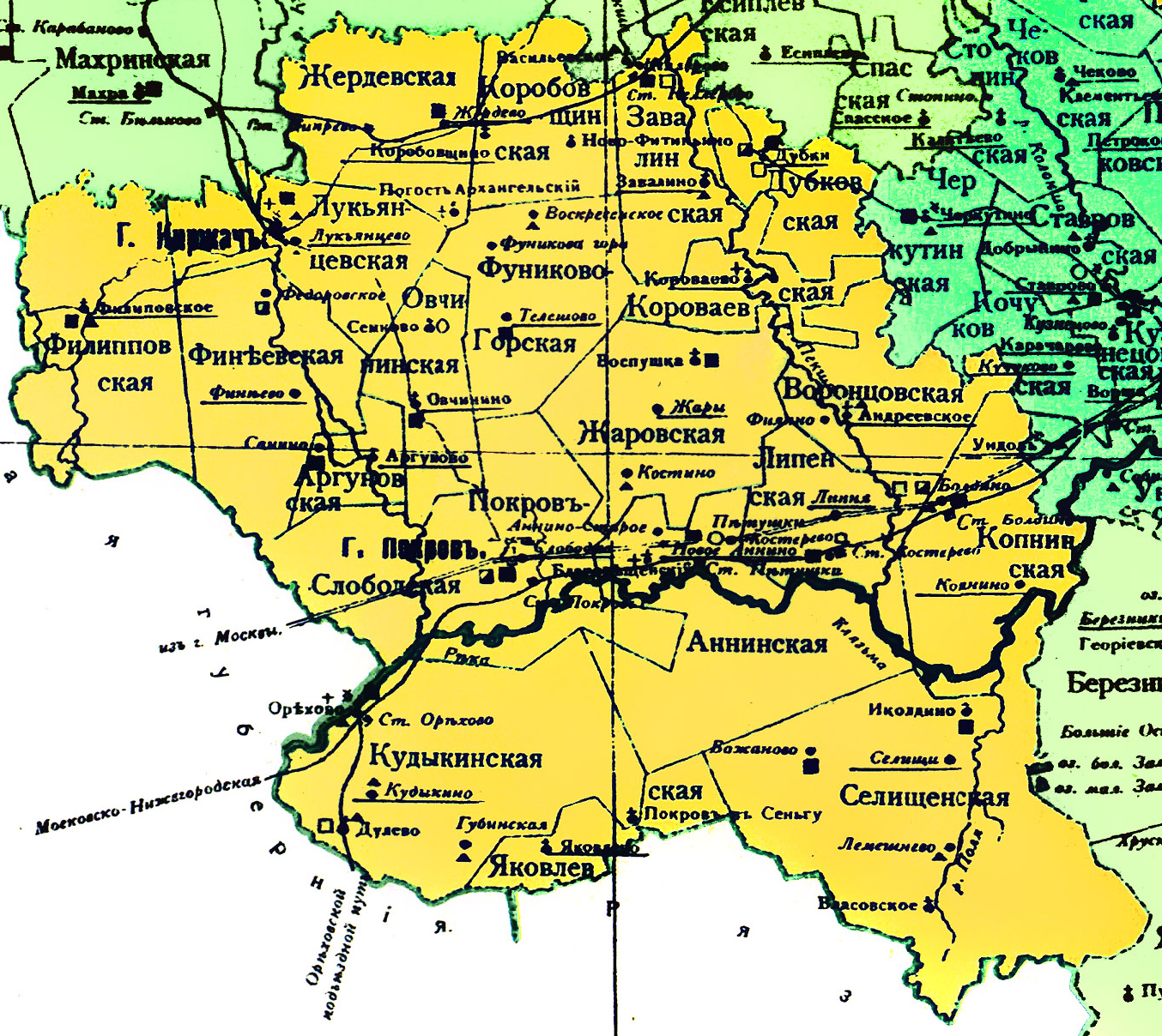 Фрагмент Карты административного деления Владимирской губернии 1898. Покровский уезд